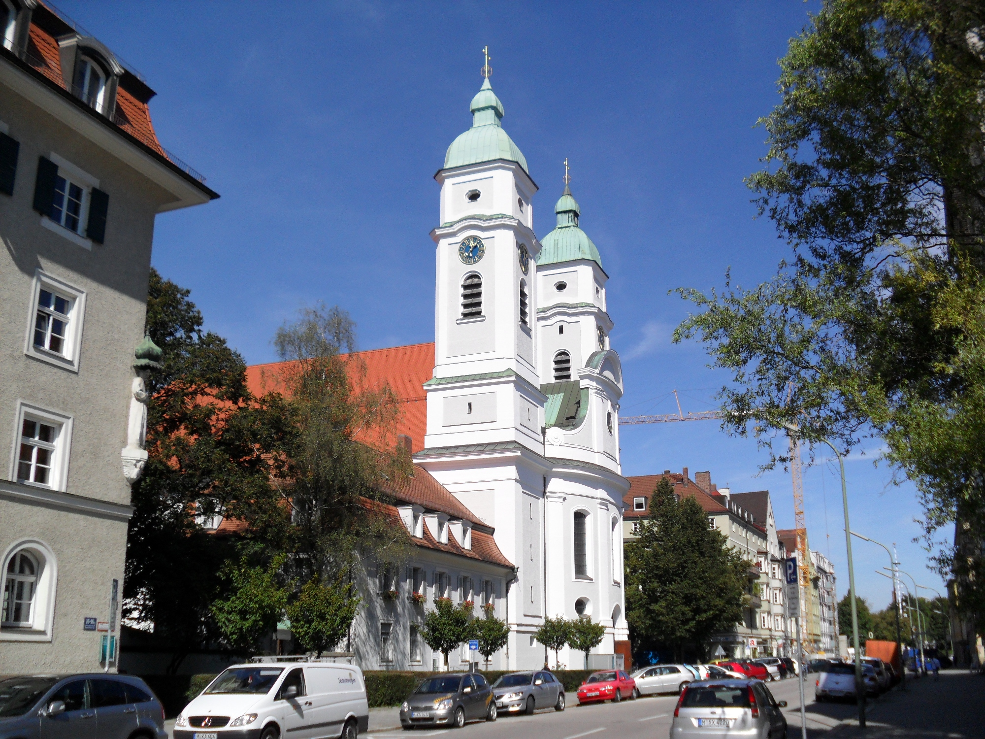 12.09.2010. _ München Kirche St. Franziskus